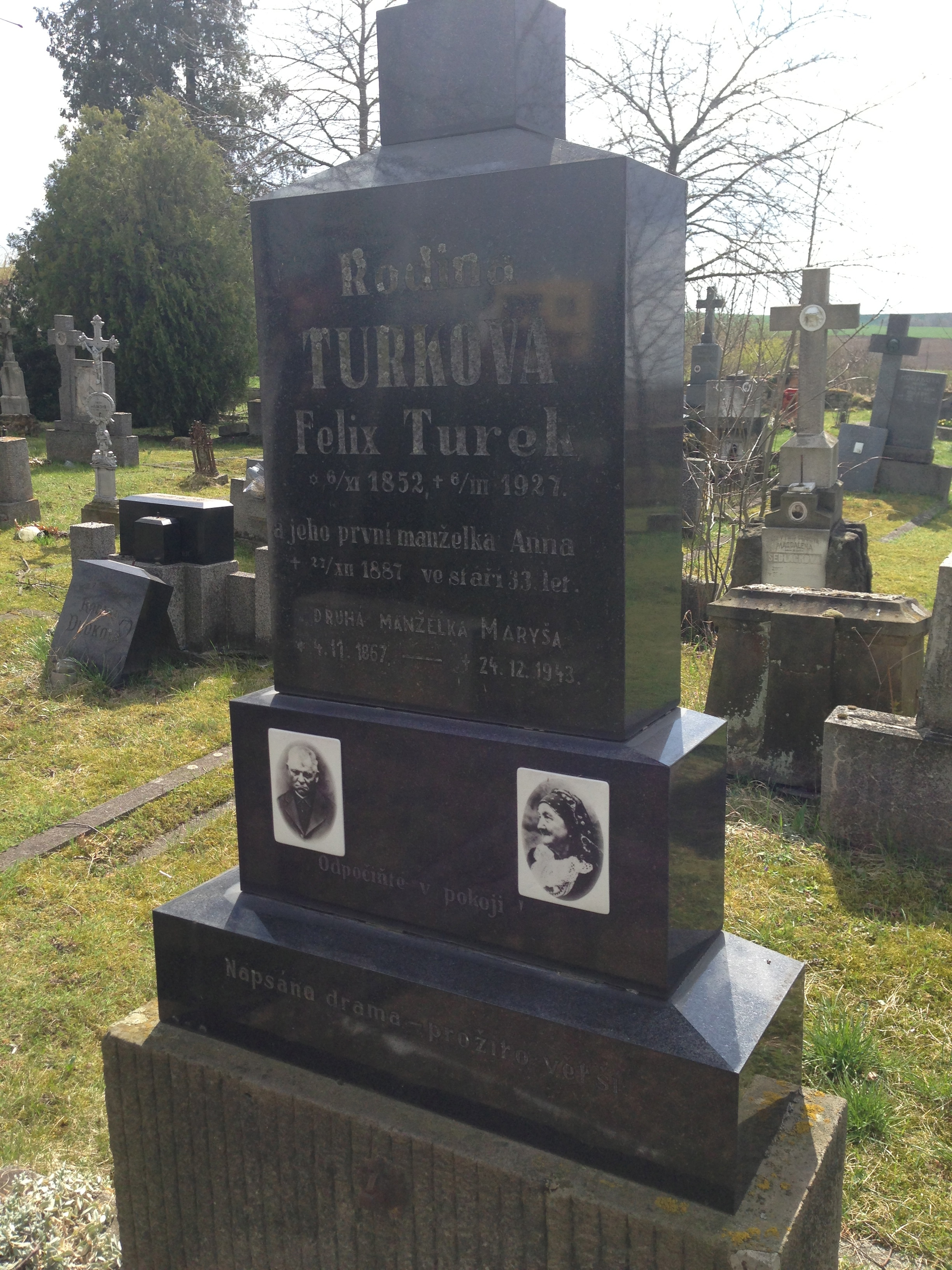 hrob Felixe Turka a jeho manzelek v Tesanech